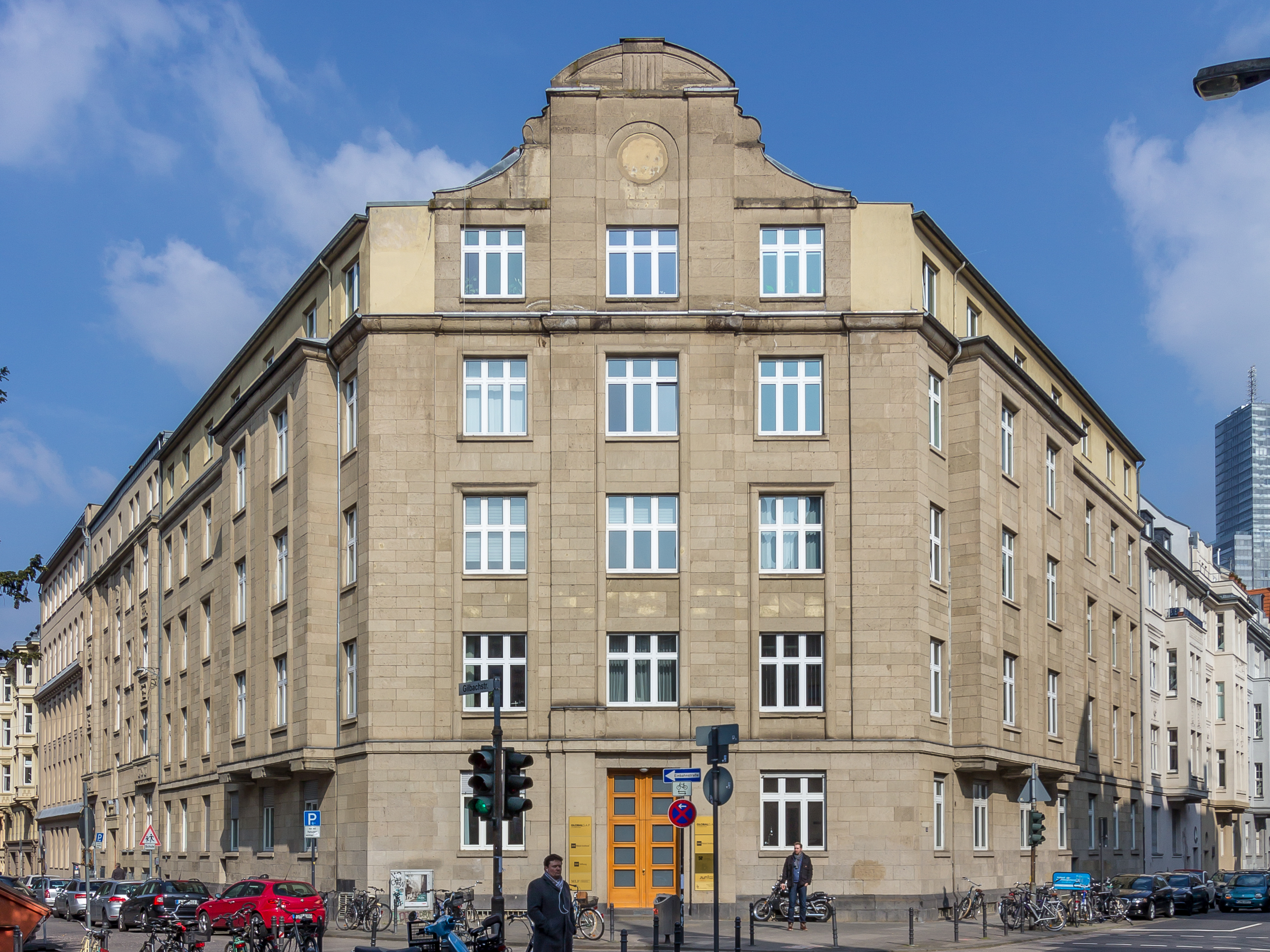 Denkmalgeschütztes Geschäftshaus Spichernstraße 55, Köln, Eckgebäude zur Gilbachstraße. Achitekten: Leopold Schweitzer und Jacob Koerfer, errichtet um 1913